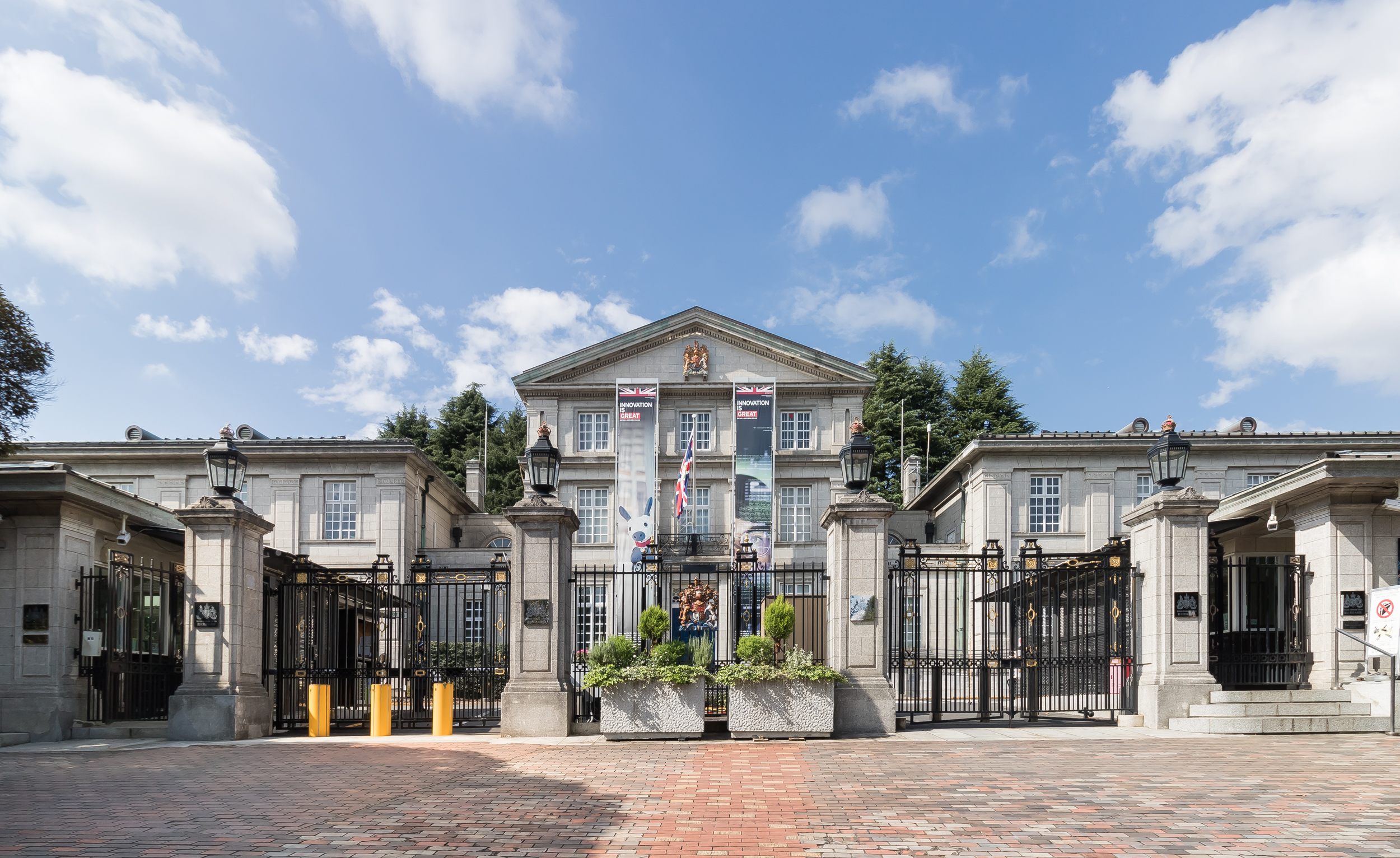 駐日英国大使館（東京都千代田区）